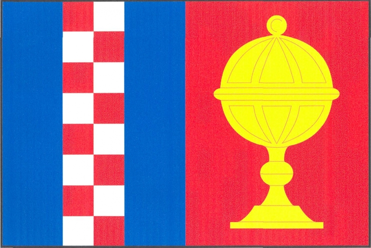 Vlajka obce Jinačovice